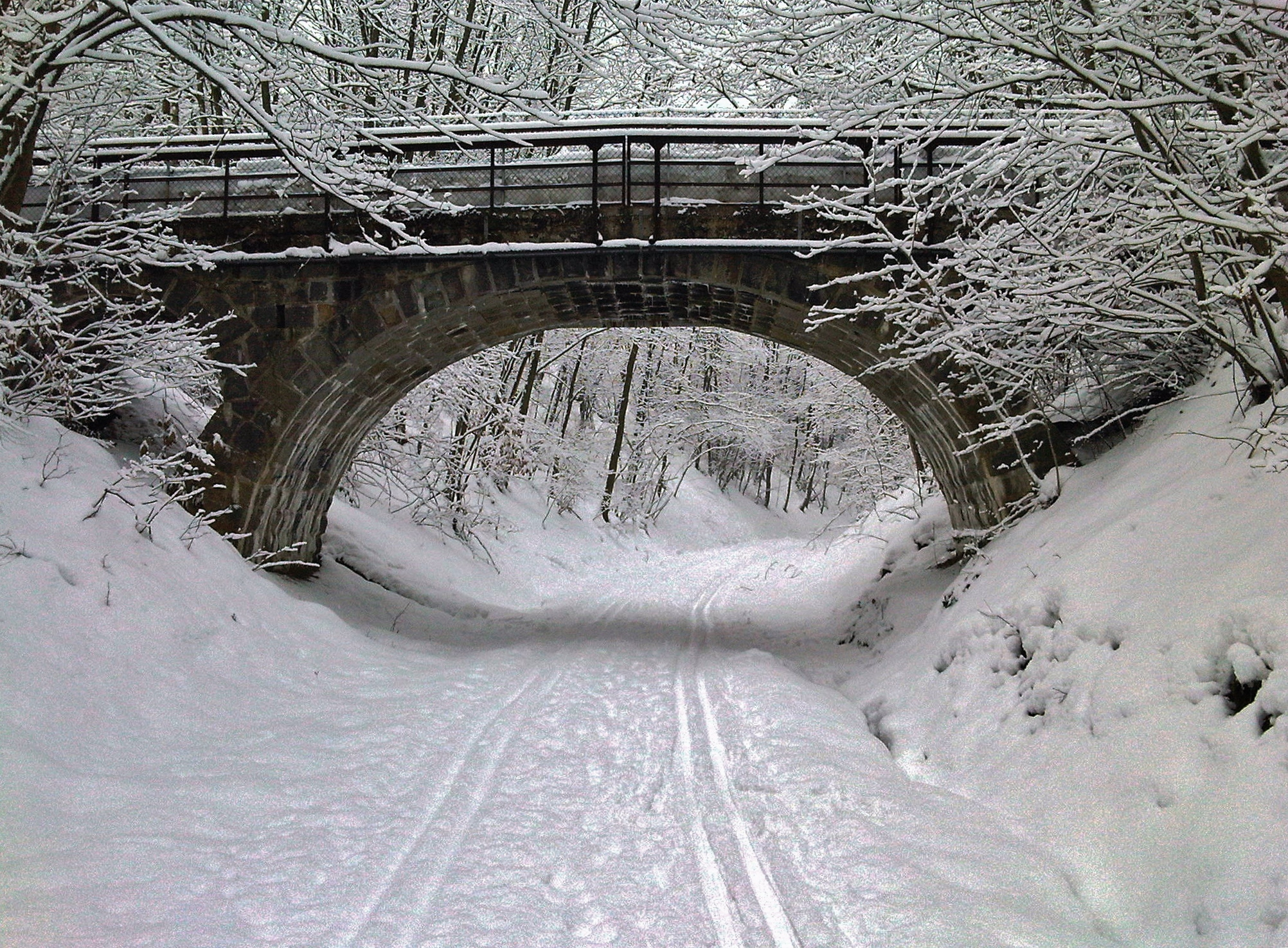 Steinbogenbrücke über die ehemalige Bahnline Straubing-Miltach in Mitterfels bei Streckenkilometer 24,9 Object location48° 58′ 56.71″ N, 12° 41′ 04.57″ E